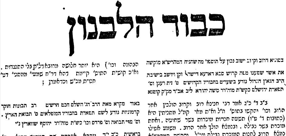 גליונו הראשון של "כבוד הלבנון", כמוסף בתוך "הלבנון"